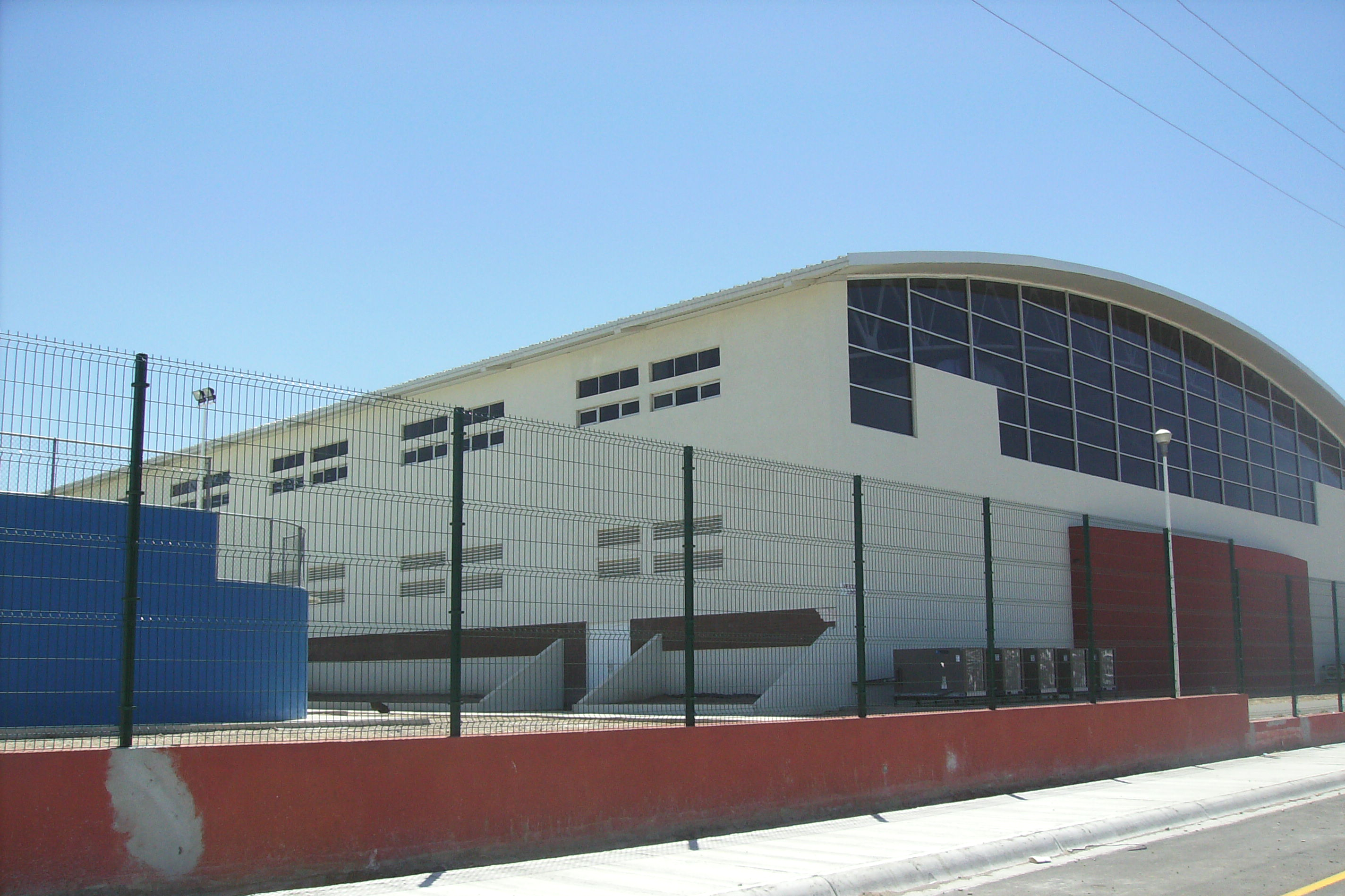 Ciudad Deportiva Indoor Stadium